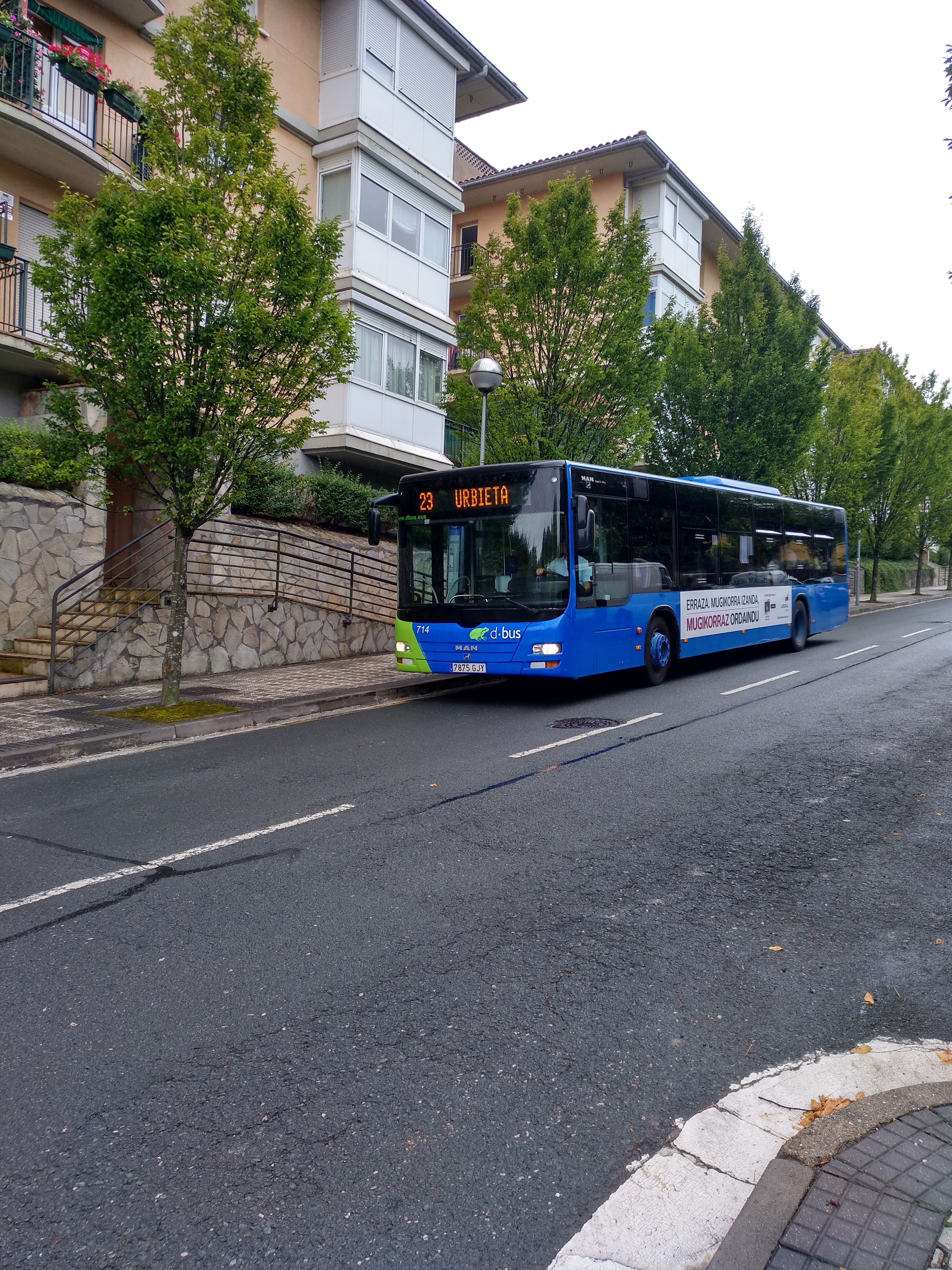 Autobús urbano de d•bus en San Sebastián, de la línea 23, junto a la parada 'Katalina Eleizegi 2'